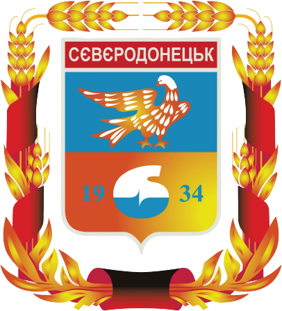 Герб м. Сєвєродонецьк